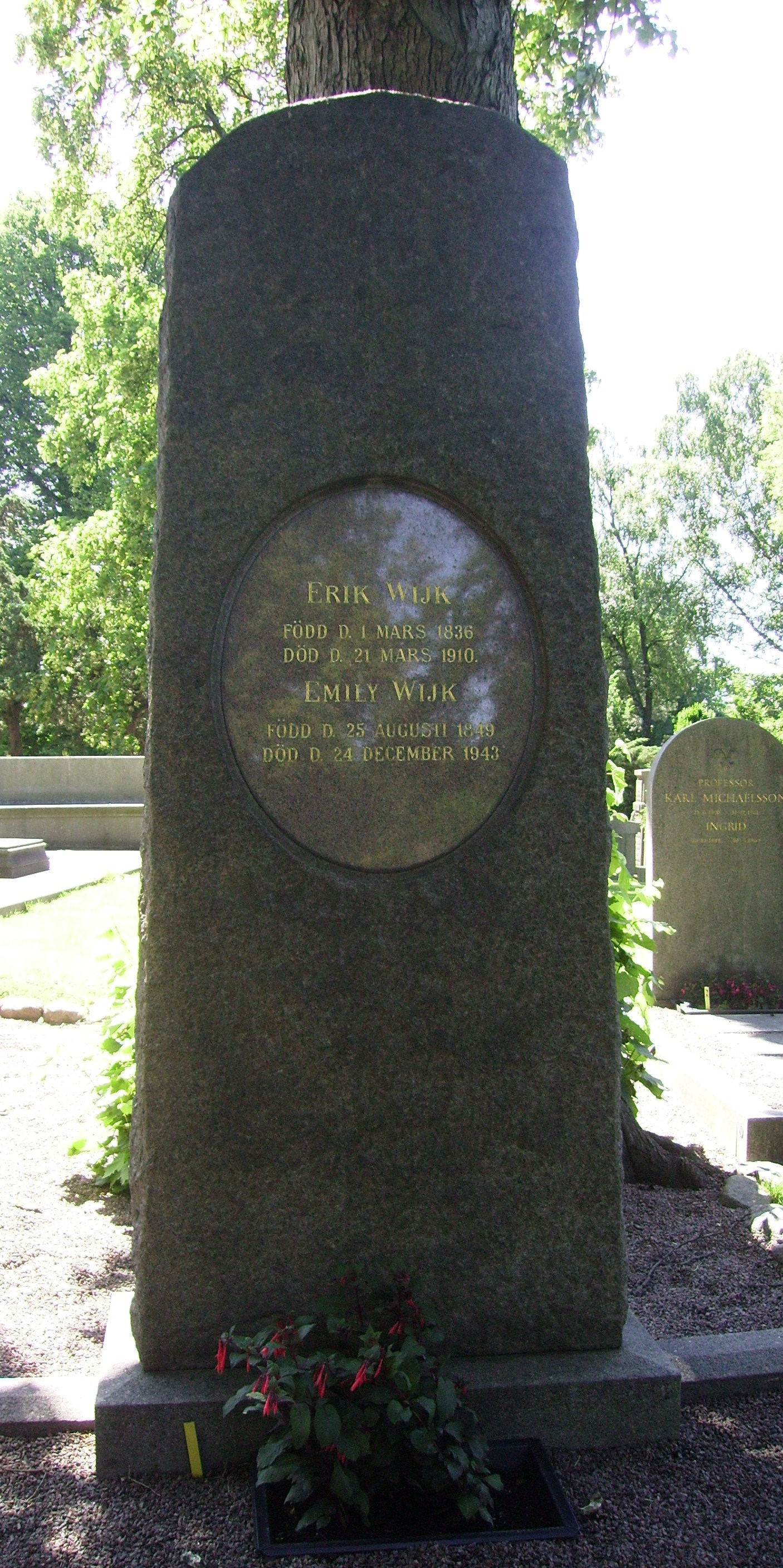 Picture of Erik Wijk's grave at Östra kyrkogården in Gothenburg.